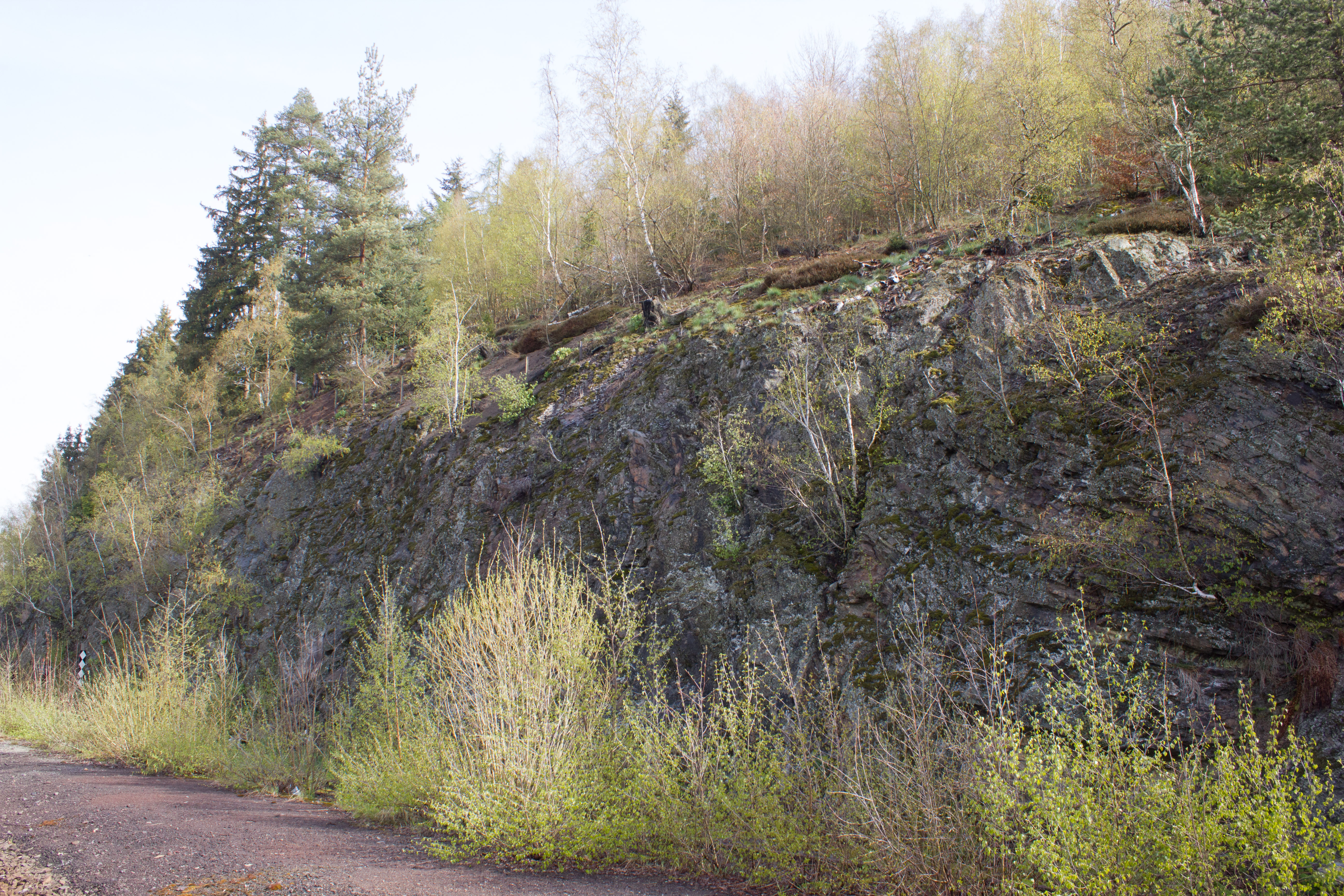 Teuschnitzer Schichten Naila, Geotop 475A013